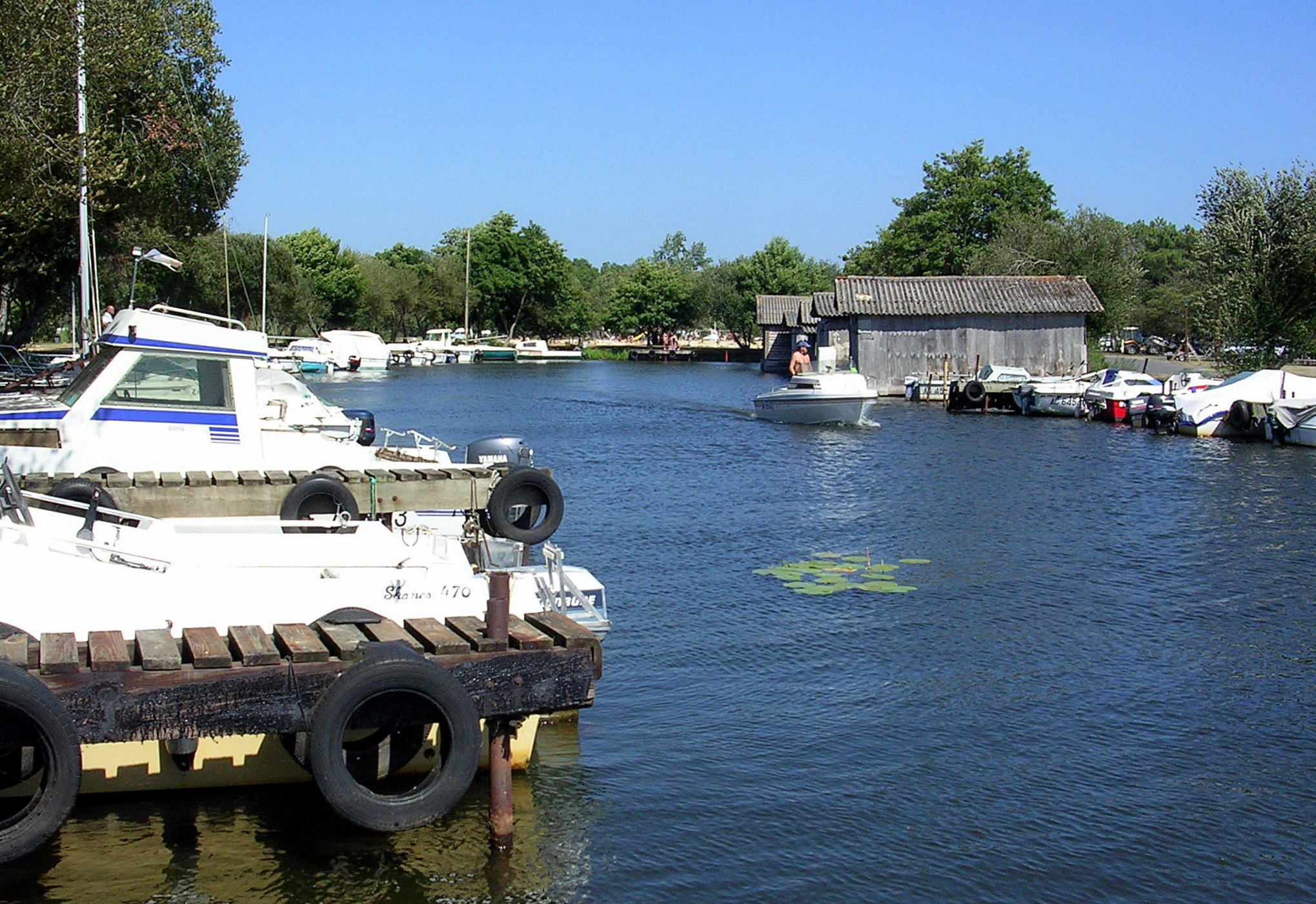 Etangs de Gastes, Landes (France)